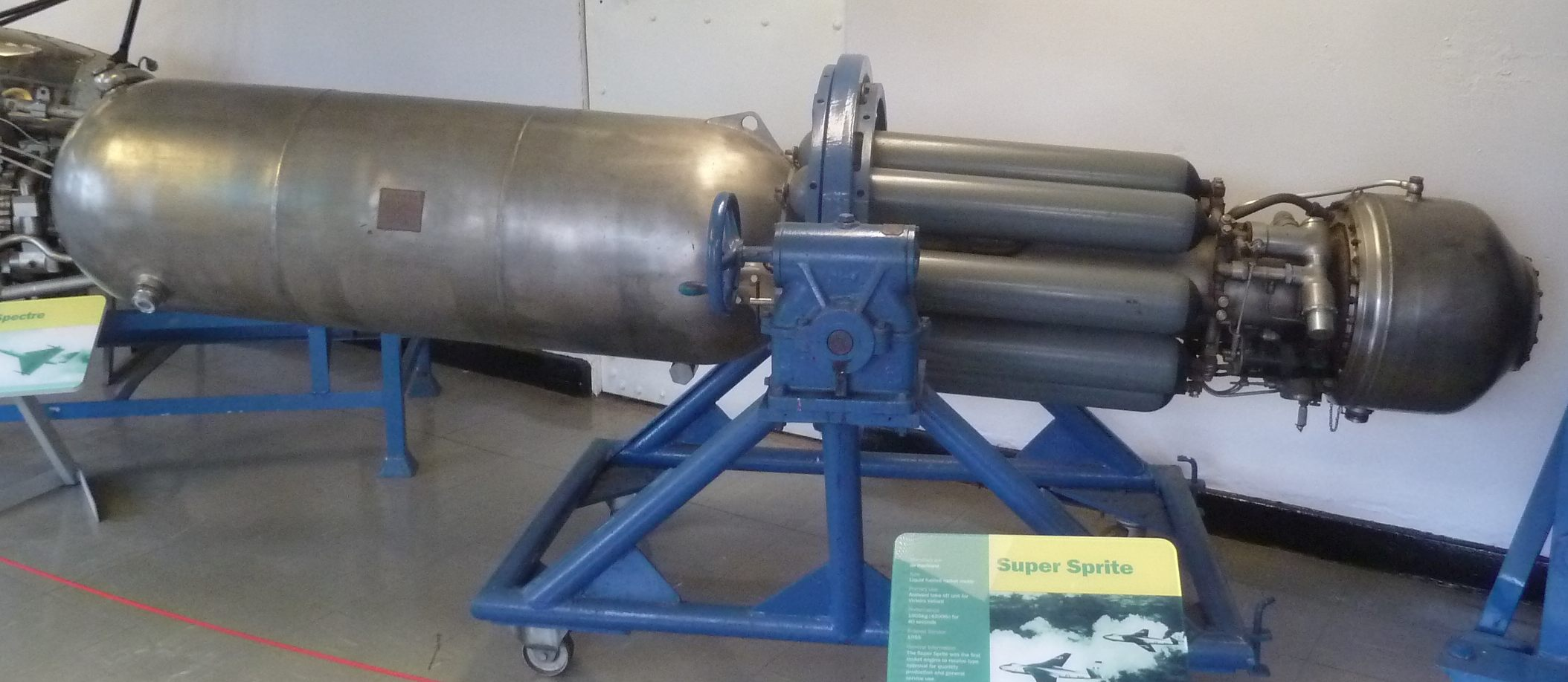 de Havilland Super Sprite D.Spr 4 RATO engine